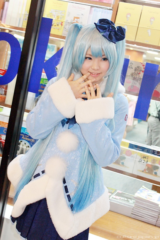 パナシェ!時代のえなこです。2013年1月28日にバンコクの紀伊國屋書店伊勢丹店で行われたサイン会の時です。